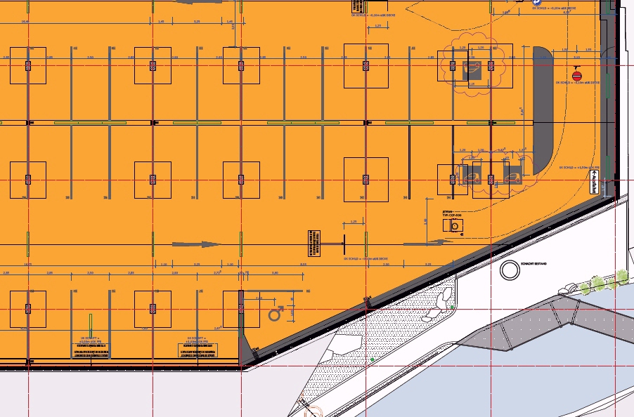 Planauszug Männerparkplatz